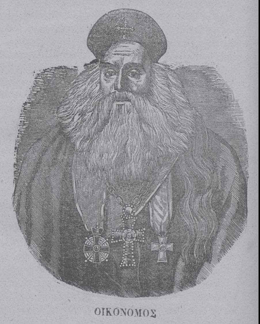 Griechischer Gelehrter, 19. Jahrhundert